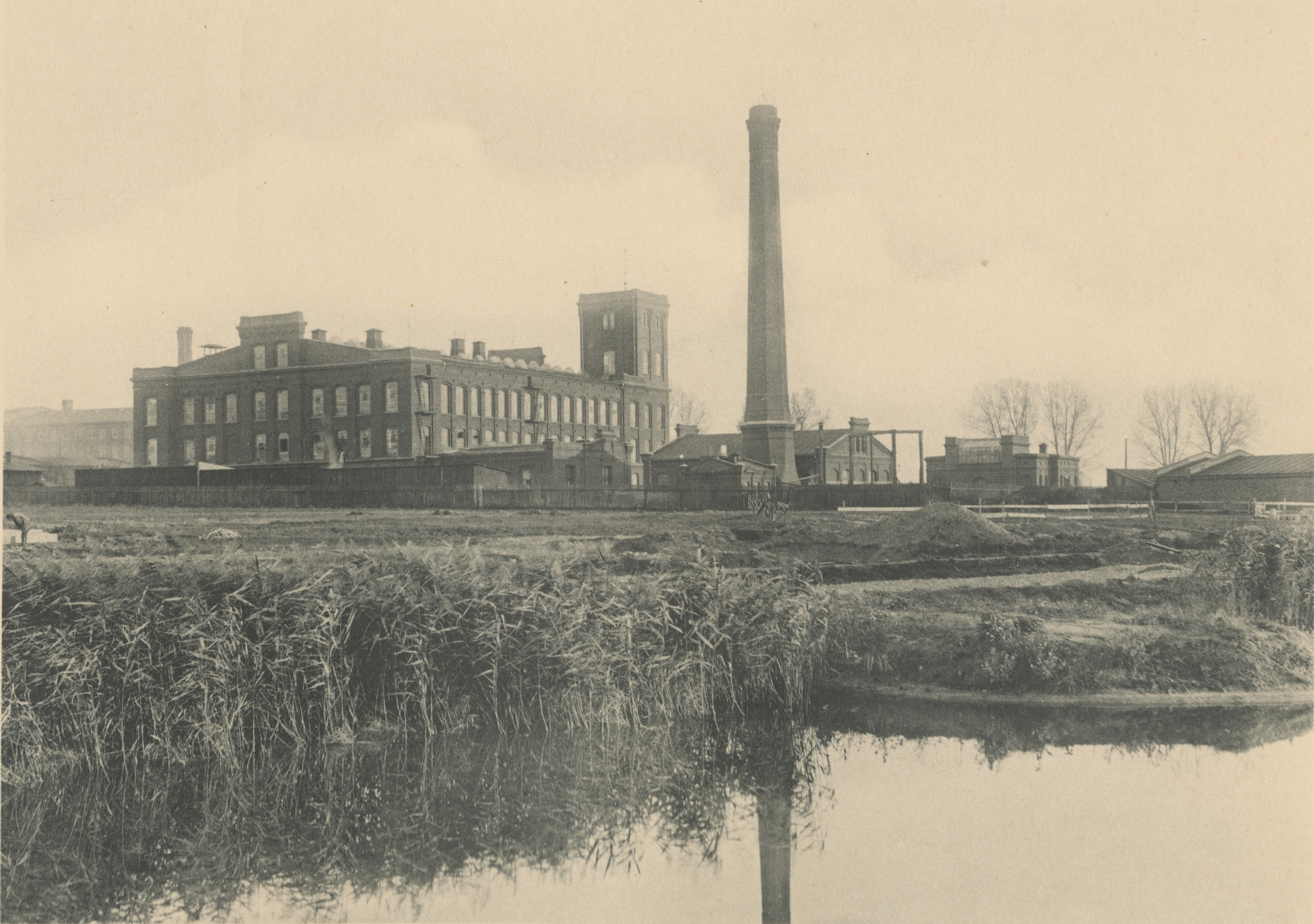 Fotografia przedstawia fabrykę wyrobów bawełnianych Henryka Grohmana. Została ona wybudowana w 1889 roku przy ulicy Emilii (obecnie ulica Tymienieckiego 22/24), obok fabryki ojca Henryka Grohmana, Ludwika. Autorem projektu był architekt Hilary Majewski, który zastosował w stylistyce kompleksu różnorodne style architektoniczne, od gotyku do renesansu. Rodzina Grohmanów od 1842 roku zajmowała się w Łodzi produkcją wyrobów bawełnianych. Traugott Grohmann przejął w wieczystą dzierżawę posiadło wodno-fabryczne „Lamus” i wybudował fabrykę, którą jego syn Ludwik przekształcił w zakłady „Ludwik Grohman”. Po śmierci ojca, w 1889 roku prowadzenie firmy przejął Henryk Grohman, który rozbudował zakład i postawił nowoczesny, wielowydziałowy kombinat włókienniczy. W drugiej dekadzie XXI wieku zabytkowa fabryka została poddana rewitalizacji i zajęta przez Łódzką Specjalną Strefą Ekonomiczną S.A., mieszcząc w sobie biura, sale konferencyjne i lokale do wynajęcia. Fotografia pochodzi z wydanego w 1896 roku albumu Bronisława Wilkoszewskiego „Widoki m. Łodzi”. Saryusz Bronisław Paweł Wilkoszewski (1847-1901), zwany "łódzkim Canaletto" był mistrzem fotografii ilustracyjnej. Udokumentował zabudowę Łodzi z końca XIX wieku przede wszystkim wille, fabryki, budynki użyteczności publicznej, obiekty sakralne, ulicę Piotrkowską. Jego zakład fotograficzny znajdował się w willi "Trianon" w Pasażu Meyera 5 (obecnie ulica Moniuszki).